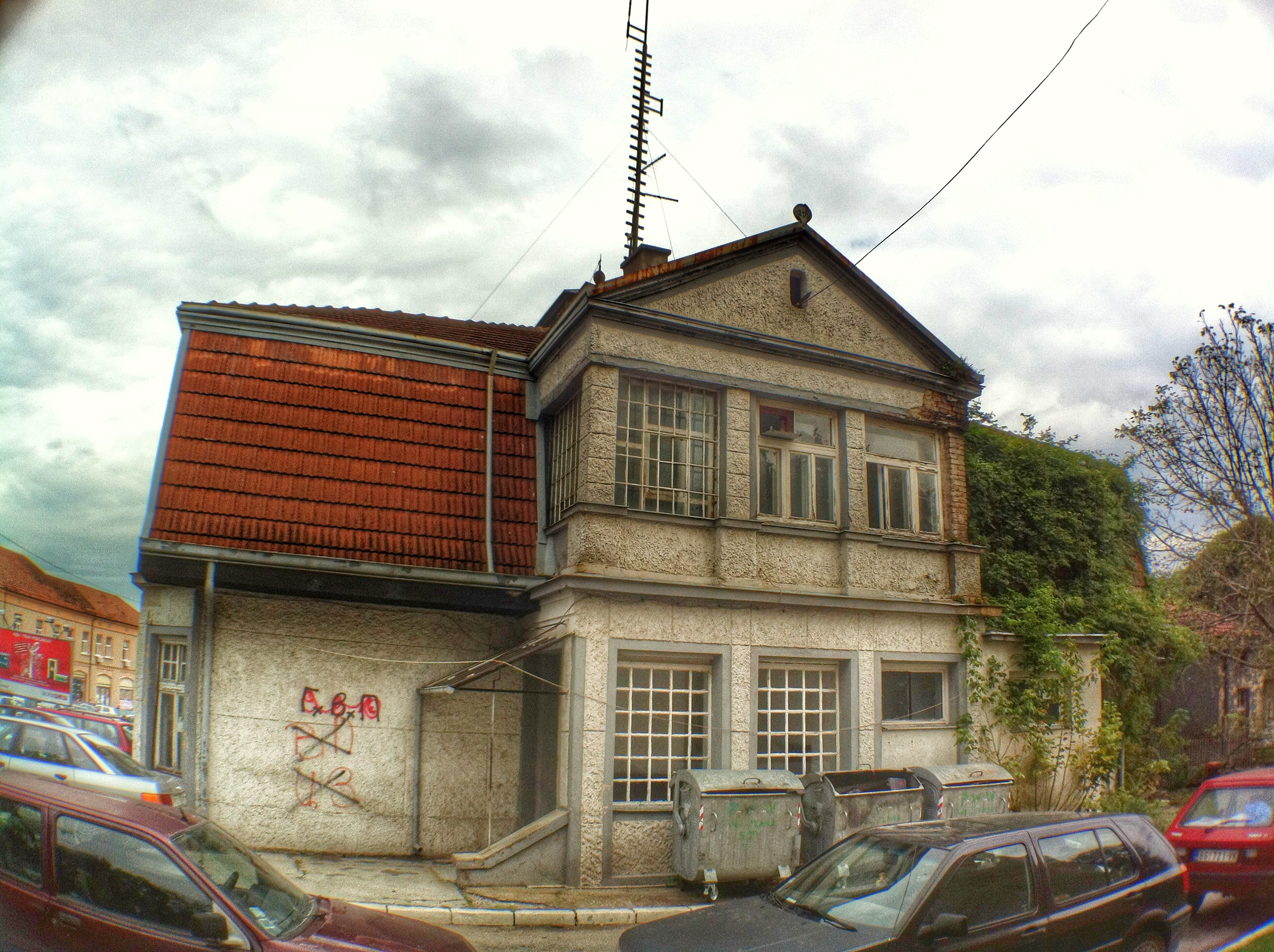 Вила се налази у улици Милоша Великог бр.79 у Великој Плани (некадашњи МУП)